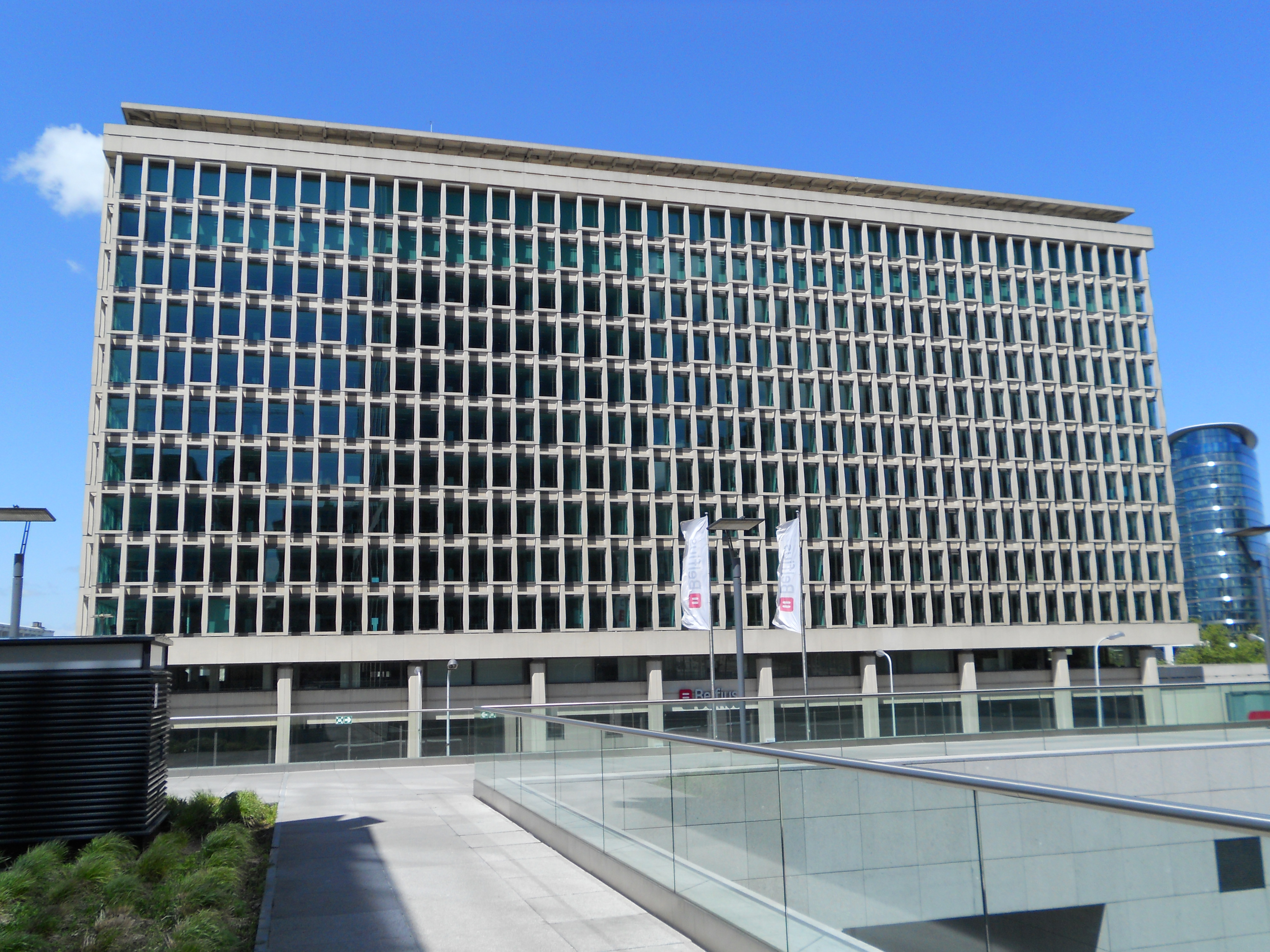 Belfius-Zentrale in Brüssel neben dem Tour des Finances